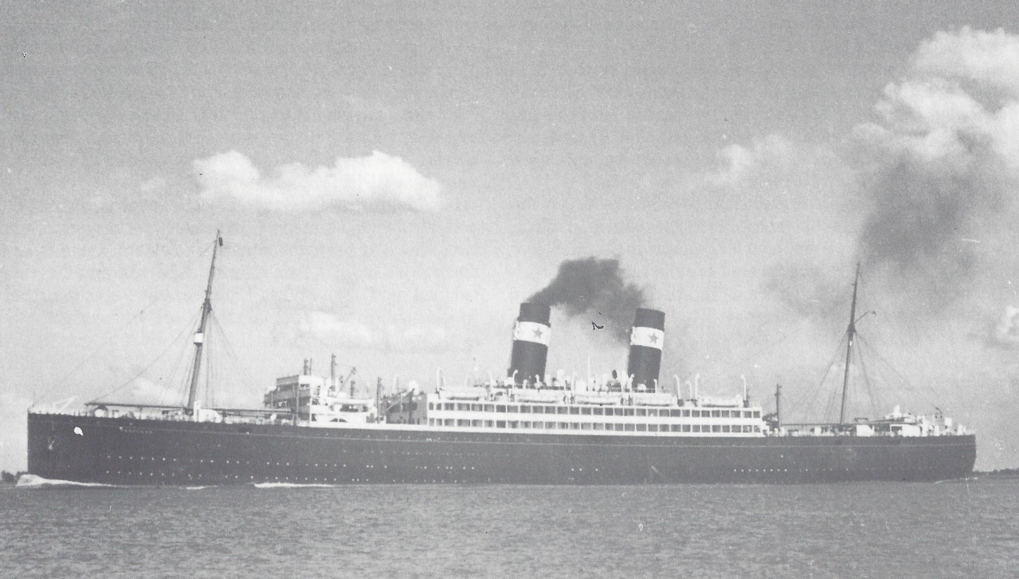 Pennland .